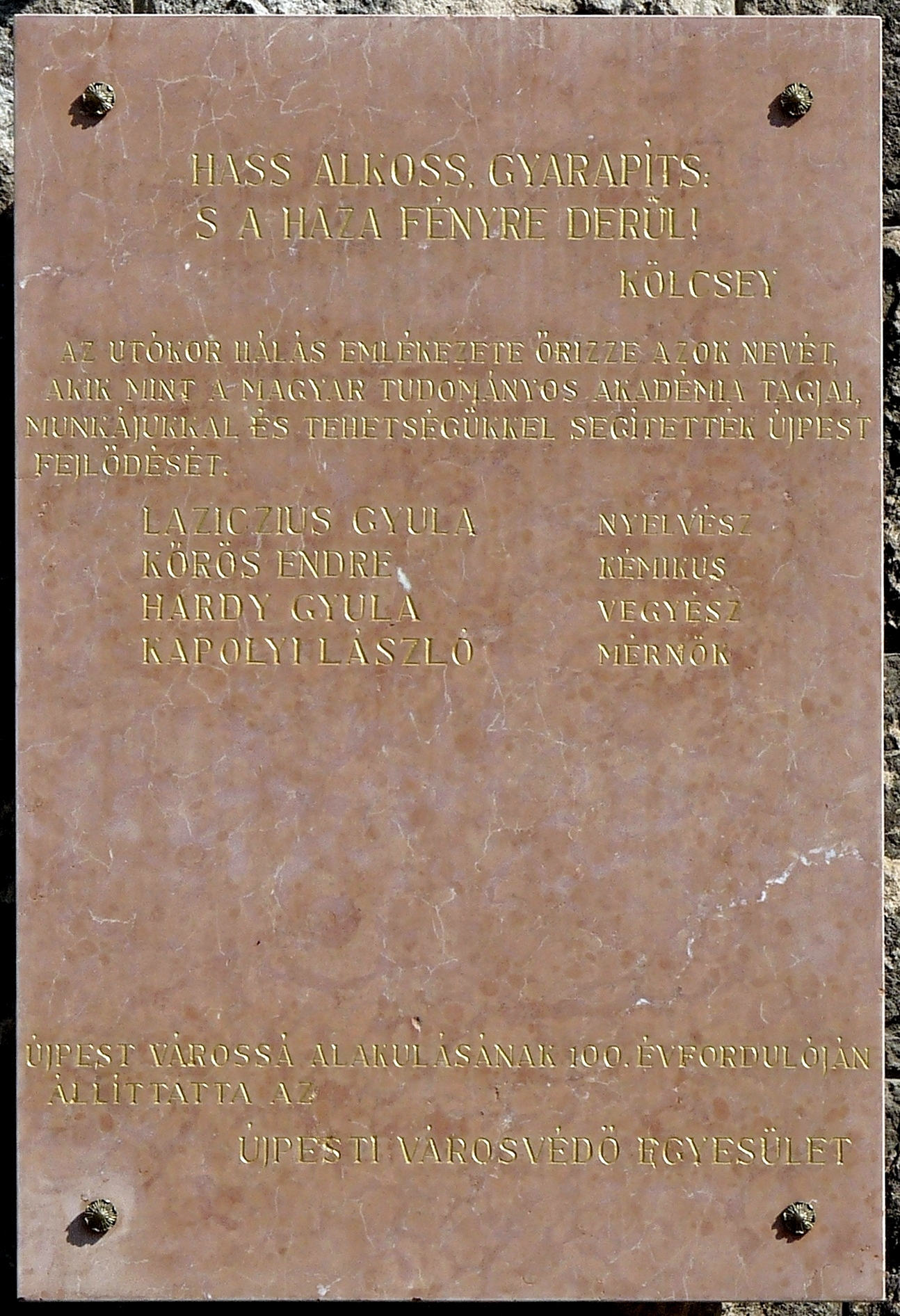 A Magyar Tudományos Akadémia azon tagjainak emléktáblája a Két Tanítási Nyelvű Műszaki Szakiskola és Gimnázium falán, akik munkájukkal és tehetségükkel segítették Újpest fejlődését: Laziczius Gyula, Kőrös Endre (2. számú emléktábla). Budapest, IV. ker. Görgey Artúr utca 26.